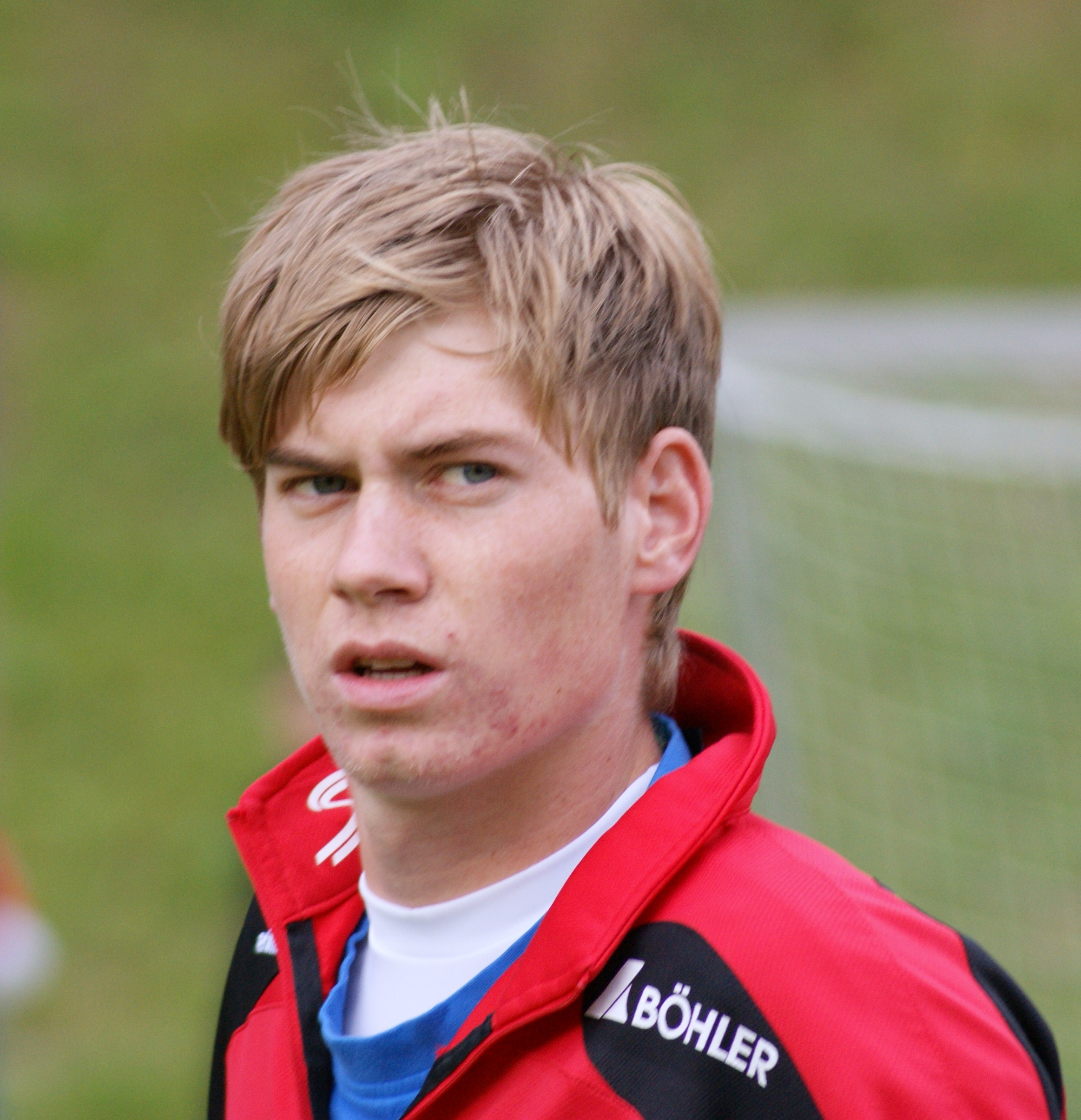 Portrait von Lukas Stadler, Spieler der Kapfenberger SV